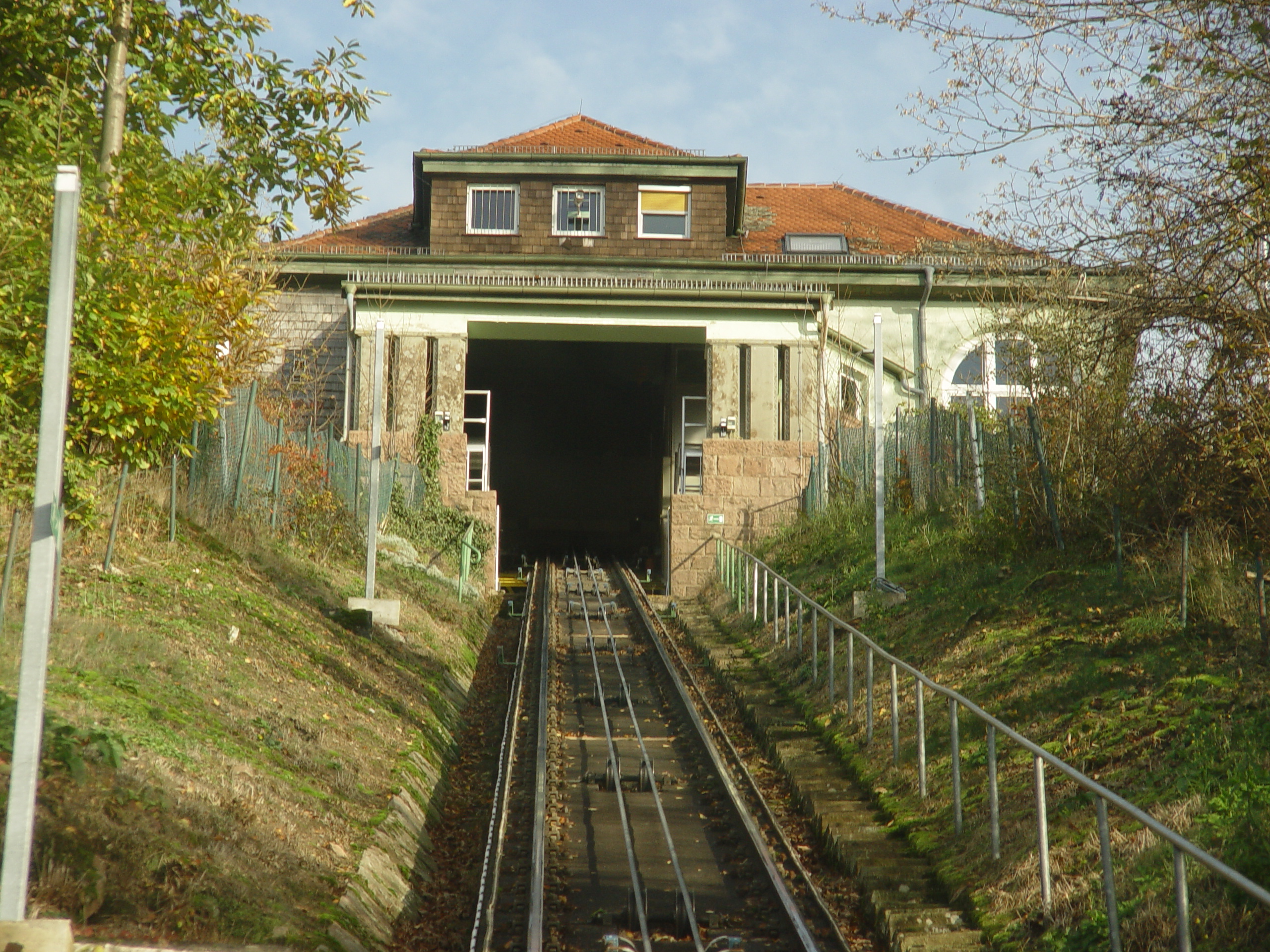 Die Bergstation der Standseilbahn auf den Merkur in Baden-Baden.